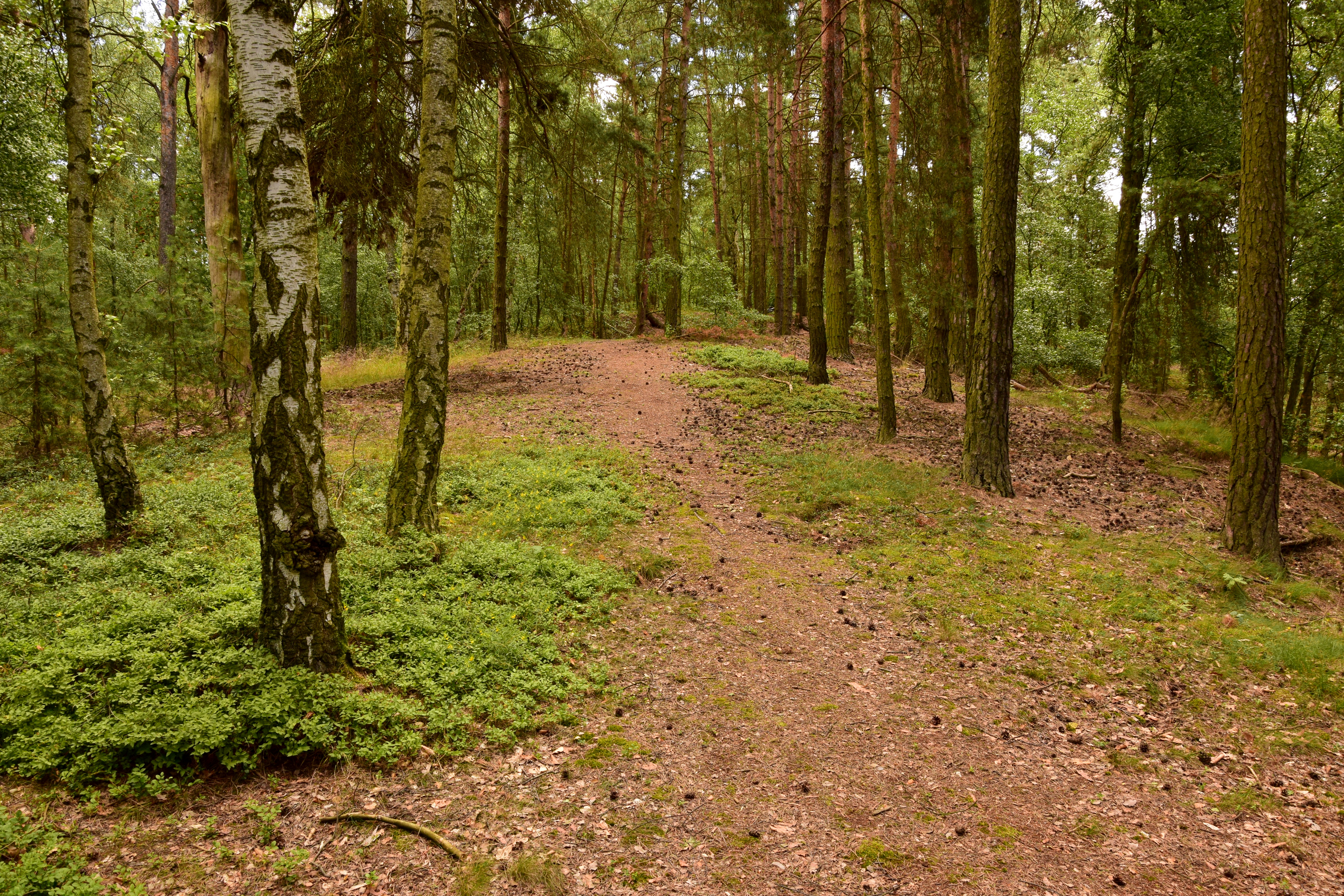 Hrad Hlavačov – plocha hradního jádra (třetí část hradu)